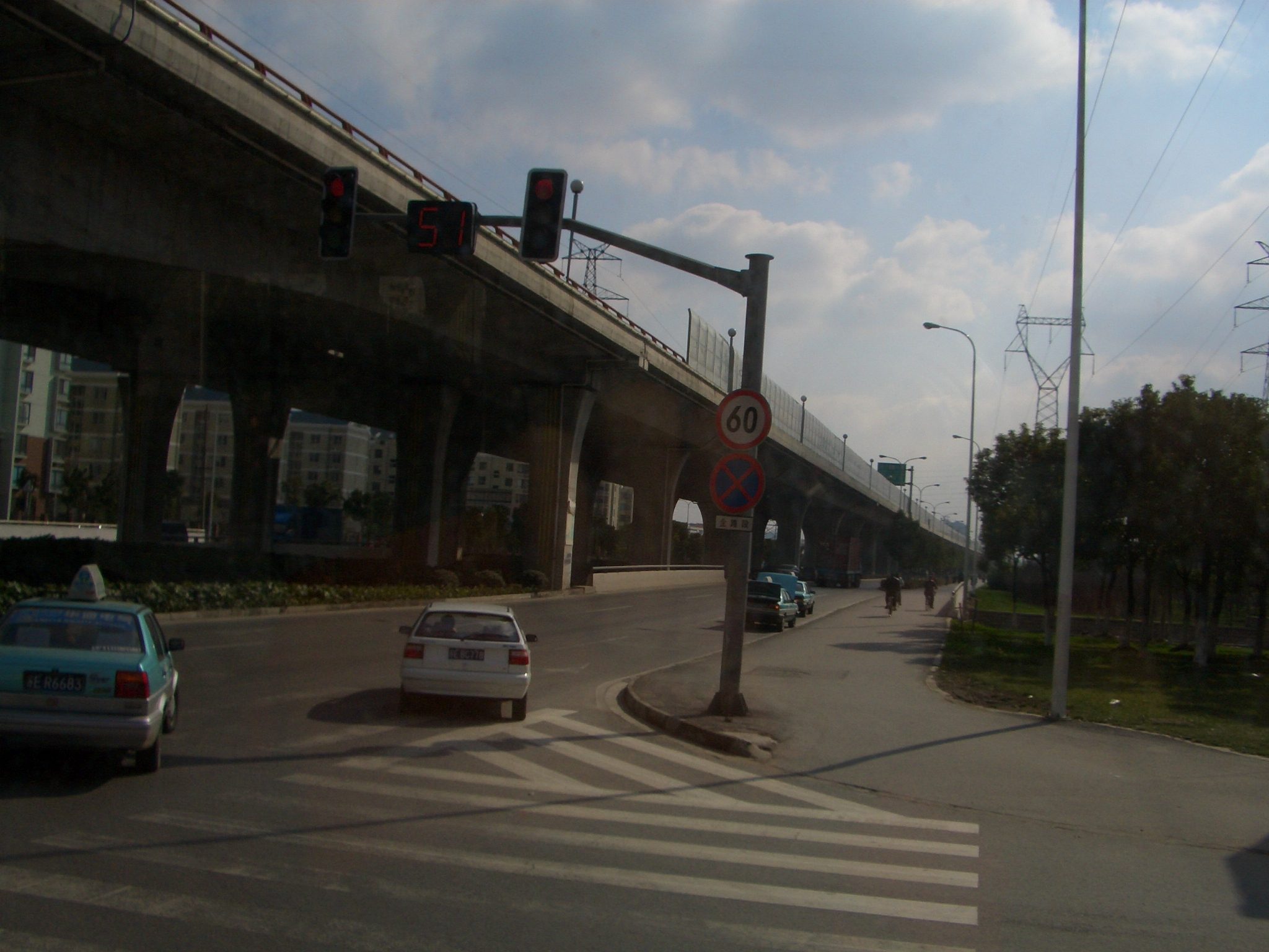 苏嘉杭高速苏州段